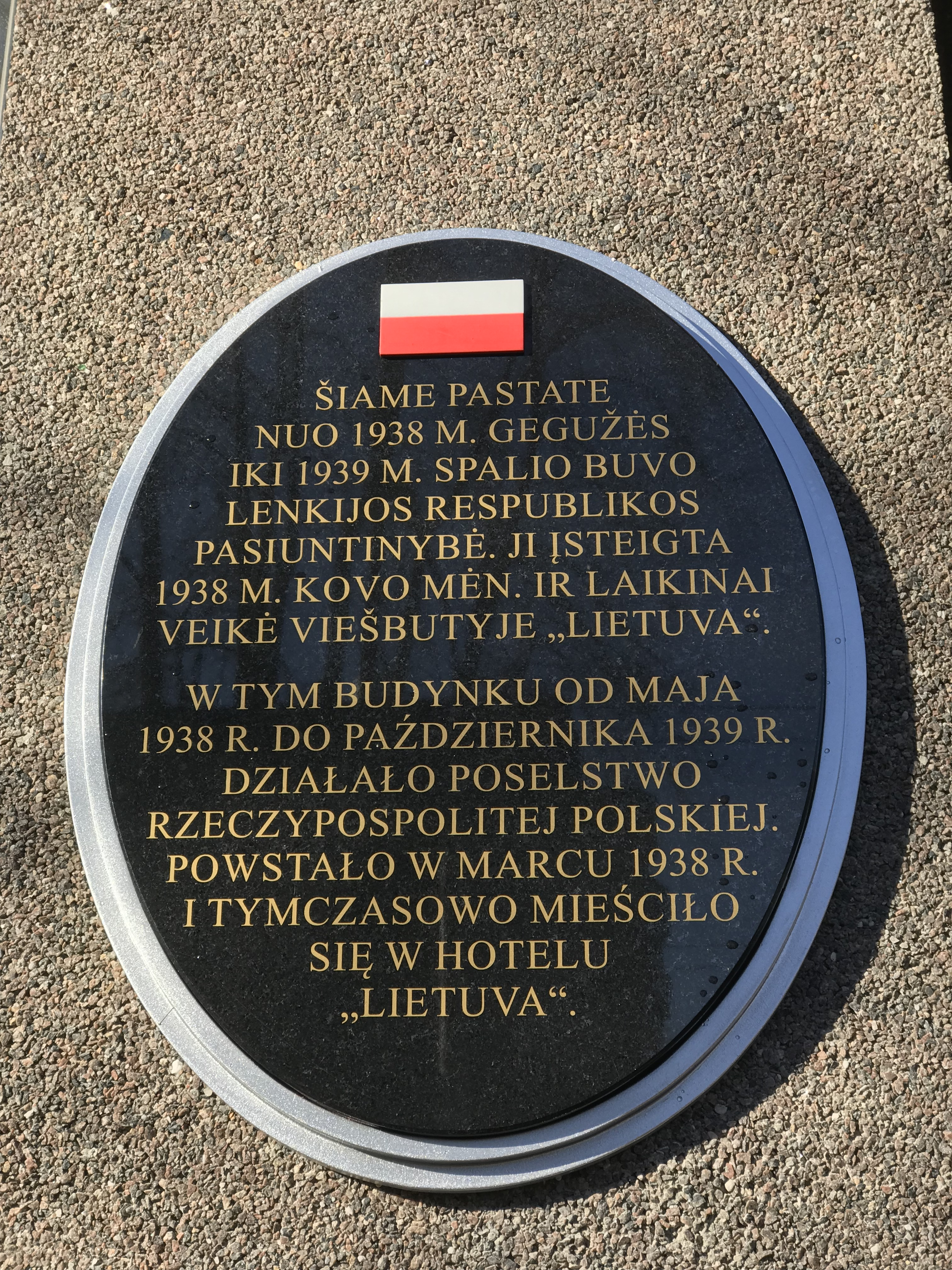 Tablica na kamienicy przy ul. Kęstučio 38 w Kownie upamiętniająca działajace w tym miejscu w latach 1938-1939 Poselstwo RP.